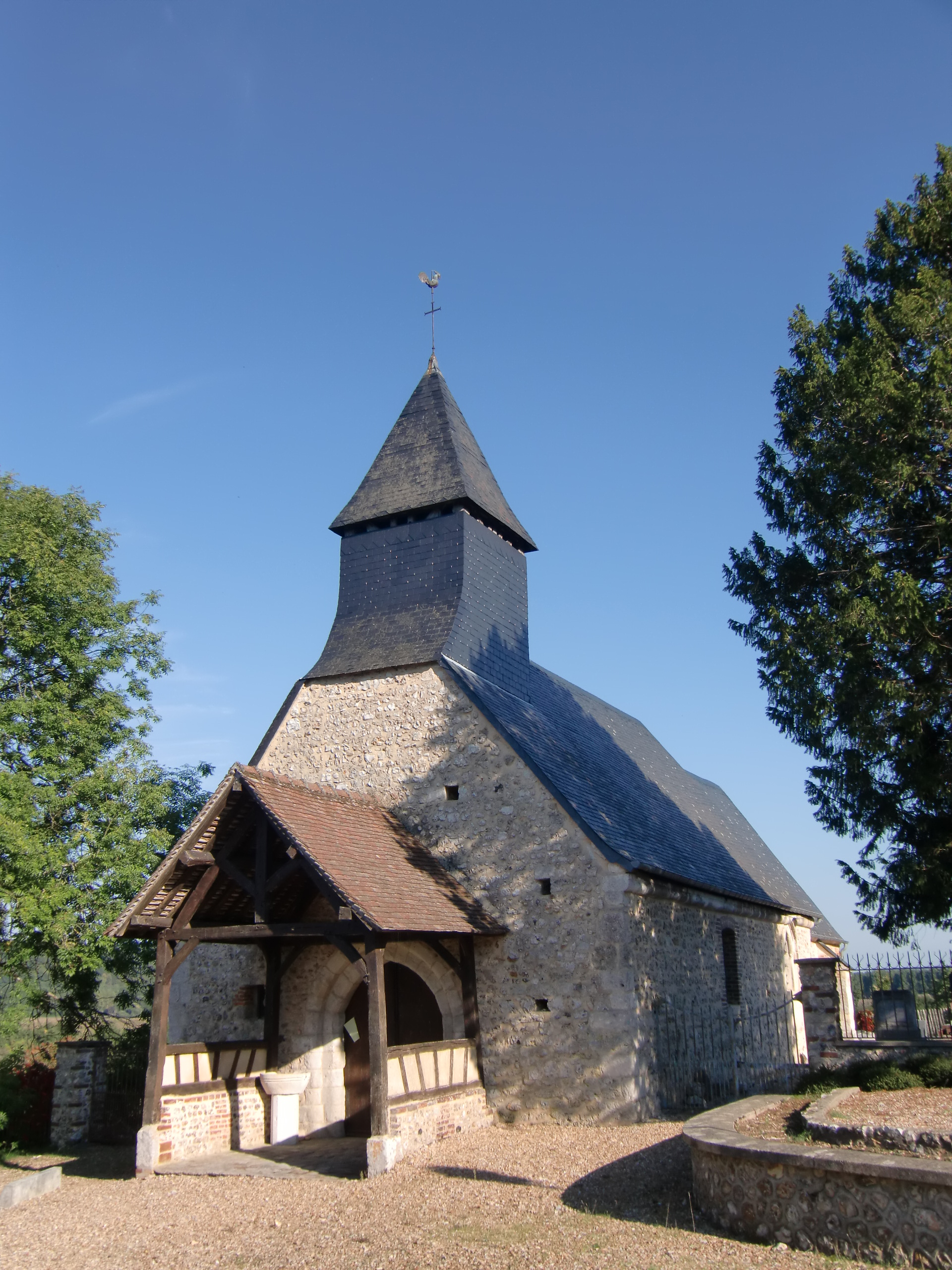 église de Saint-Sulpice-de-Grimbouville (Eure, Normandie, France)